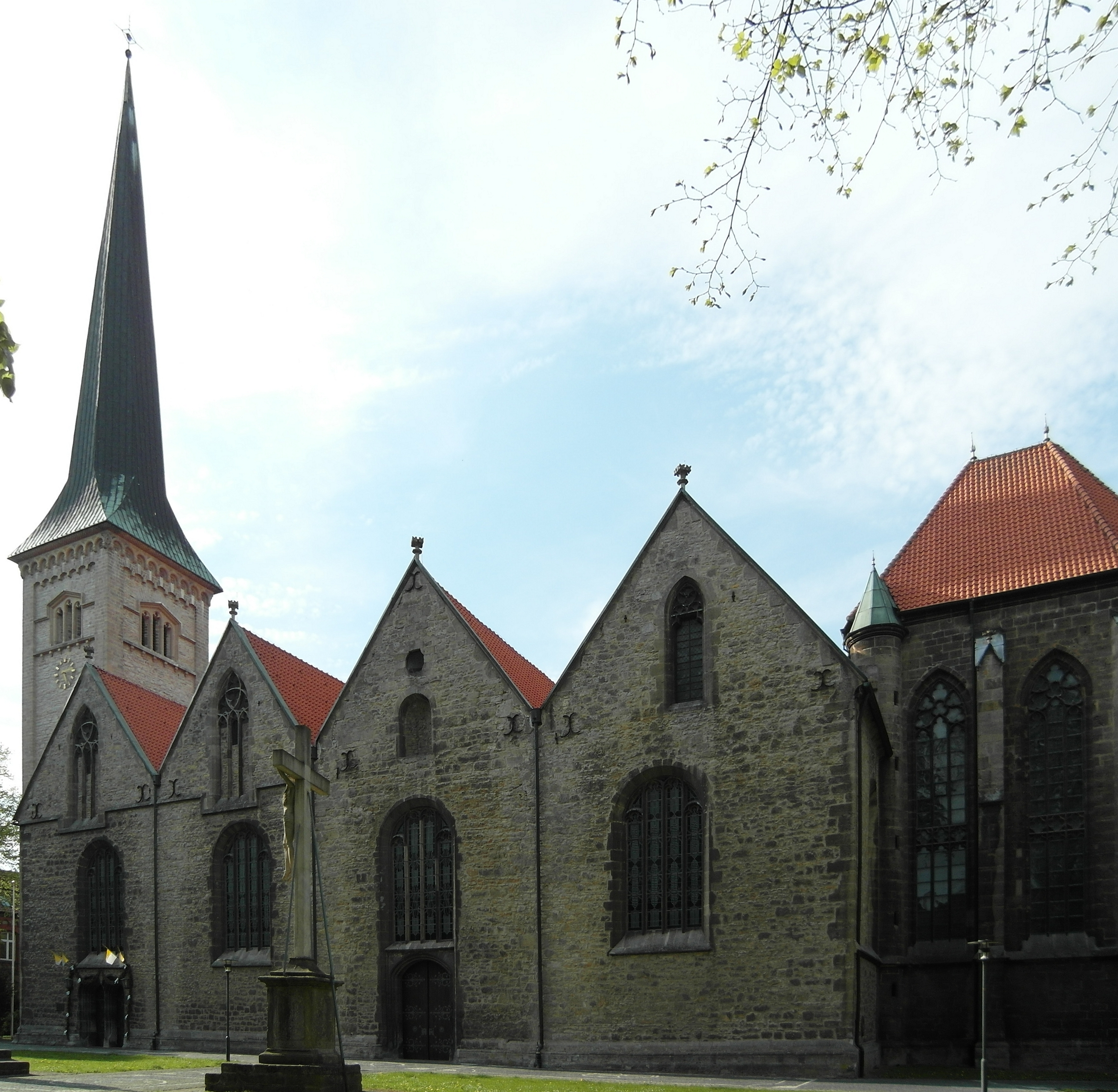 Dieses Foto zeigt die kath. Stadtpfarrkirche in Brakel. This is a photograph of an architectural monument.